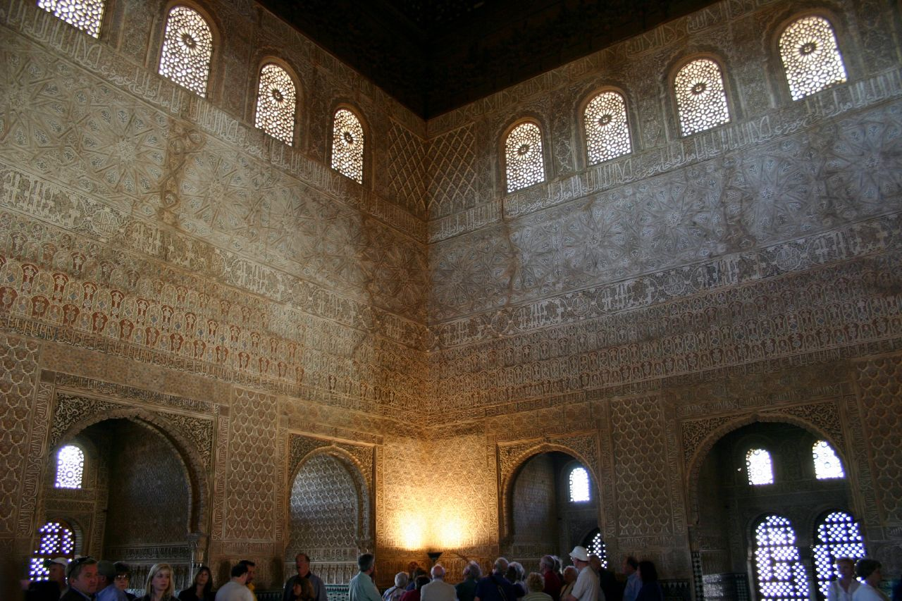 Alhambra, Granada, SpainAlhambra